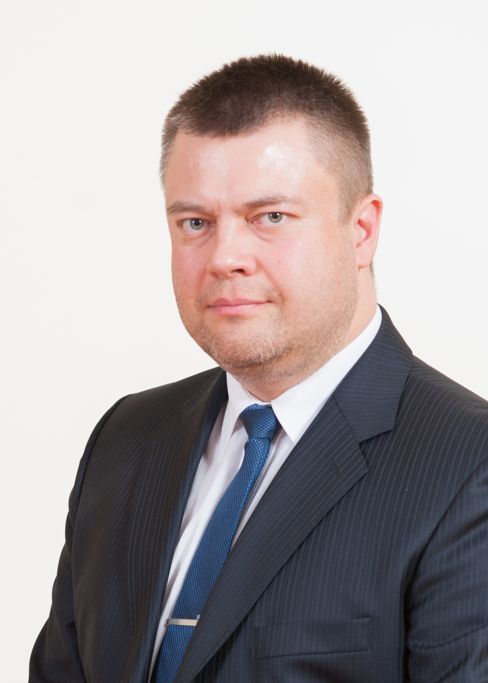 Tanel Talve